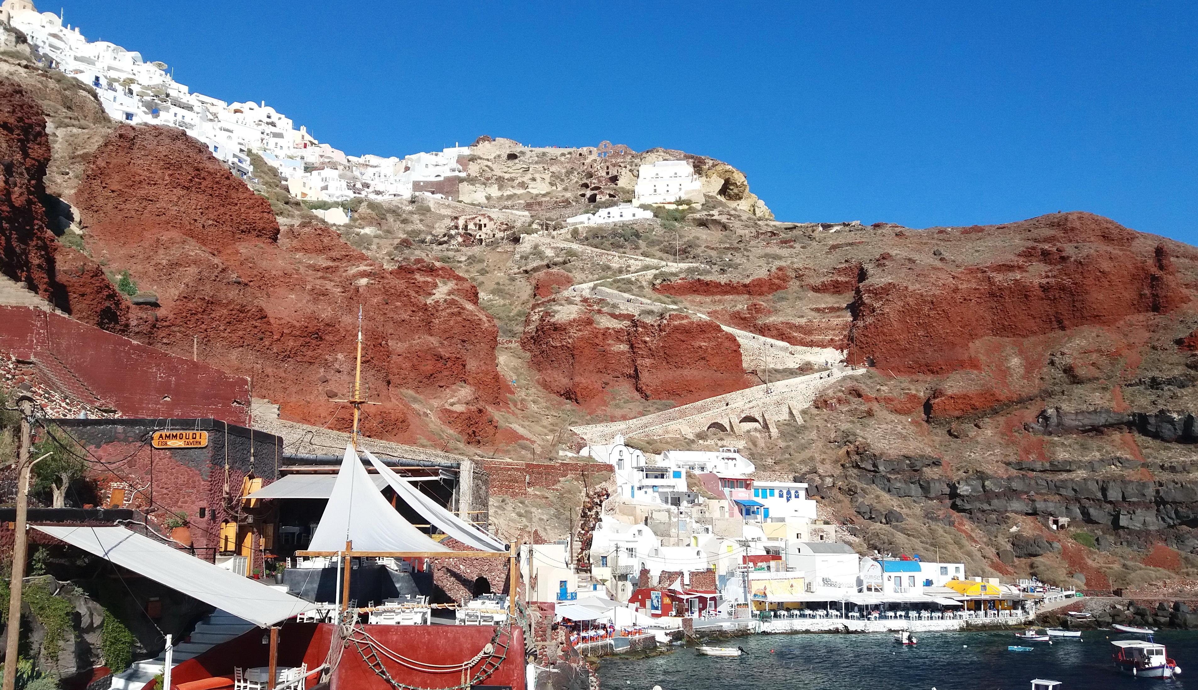 Santorini Amoudi port, down of Oia village